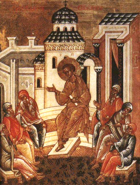 Христос в храме Иерусалимском (Беседа Христа с книжниками; Преполовение). Конец XV - начало XVI в.